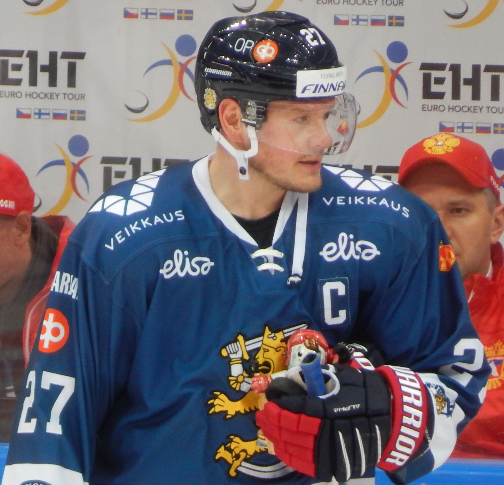 Кубок Первого Канала 2017, матч Финляндия - Южная Корея (15 декабря 2017) 27 KONTIOLA,Petri